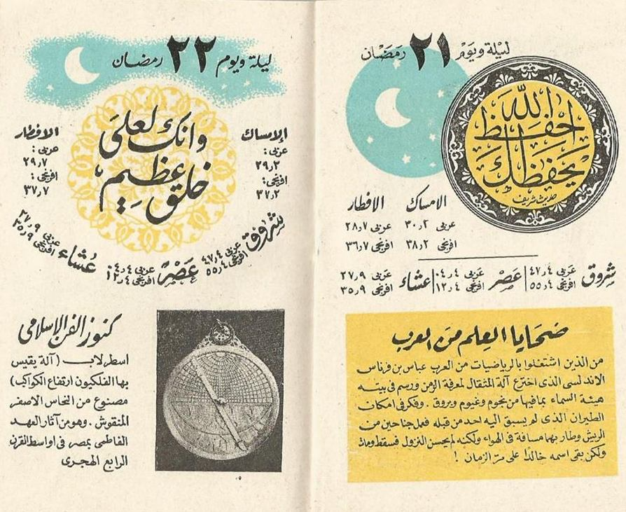 إمساكية رمضان سنة 1953